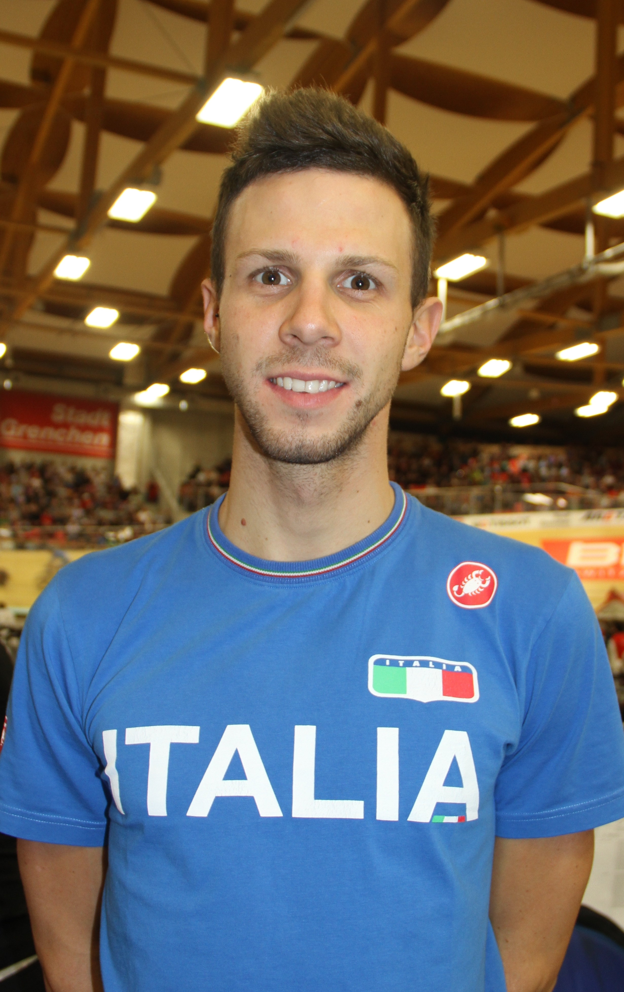 Michele Scartezzini, italienischer Radsportler The making of this document was supported by the Community-Budget of Wikimedia Germany.